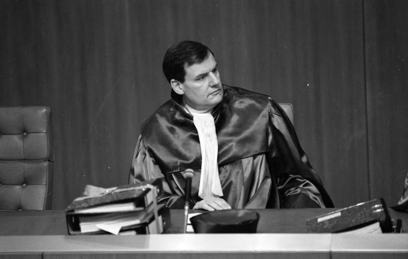 Am 17.1.1989 verhandelte der II. Senat des Bundesverfassungsgerichtes über die Verfassungsmäßigkeit des Bundeshaushaltsgesetzes für 1981. Damals hatte die SPD/FDP-Koalition die Kreditermächtigung für den Haushalt um 1,9 Millarden DM höher angesetzt als die für Investitionen vorgesehenen Ausgaben. Da nach Meinung der damaligen Opposition, der CDU/CSU-Bundestagsfraktion, hiermit gegen Artikel 115 des Grundgesetzes verstoßen wurde, hatten 231 Abgeordete der CDU/CSU-Fraktion am 6.9.1982 den Antrag beim Bundesverfassungsgericht gestellt, die Bestimmung über die damalige Kreditermächtigung für verfassungwidrig zu erklären. Artikel 115 verpflichtet, die Verschuldung unterhalb der für Investitionen vorgesehenen Ausgaben zu halten. Die Entscheidung in diesem "Abstrakten Normenkontrollverfahren" soll am 18. April 1989 verkündet werden.